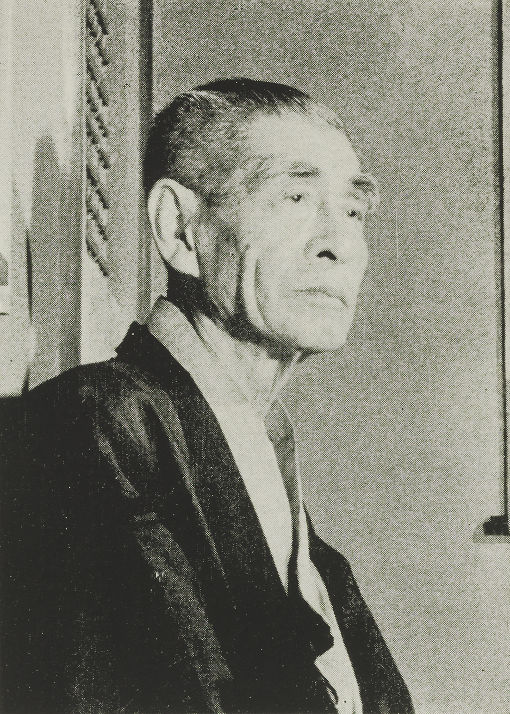 Portrait of Matsunaga Yasuzaemon (松永安左衛門, 1875 – 1971)